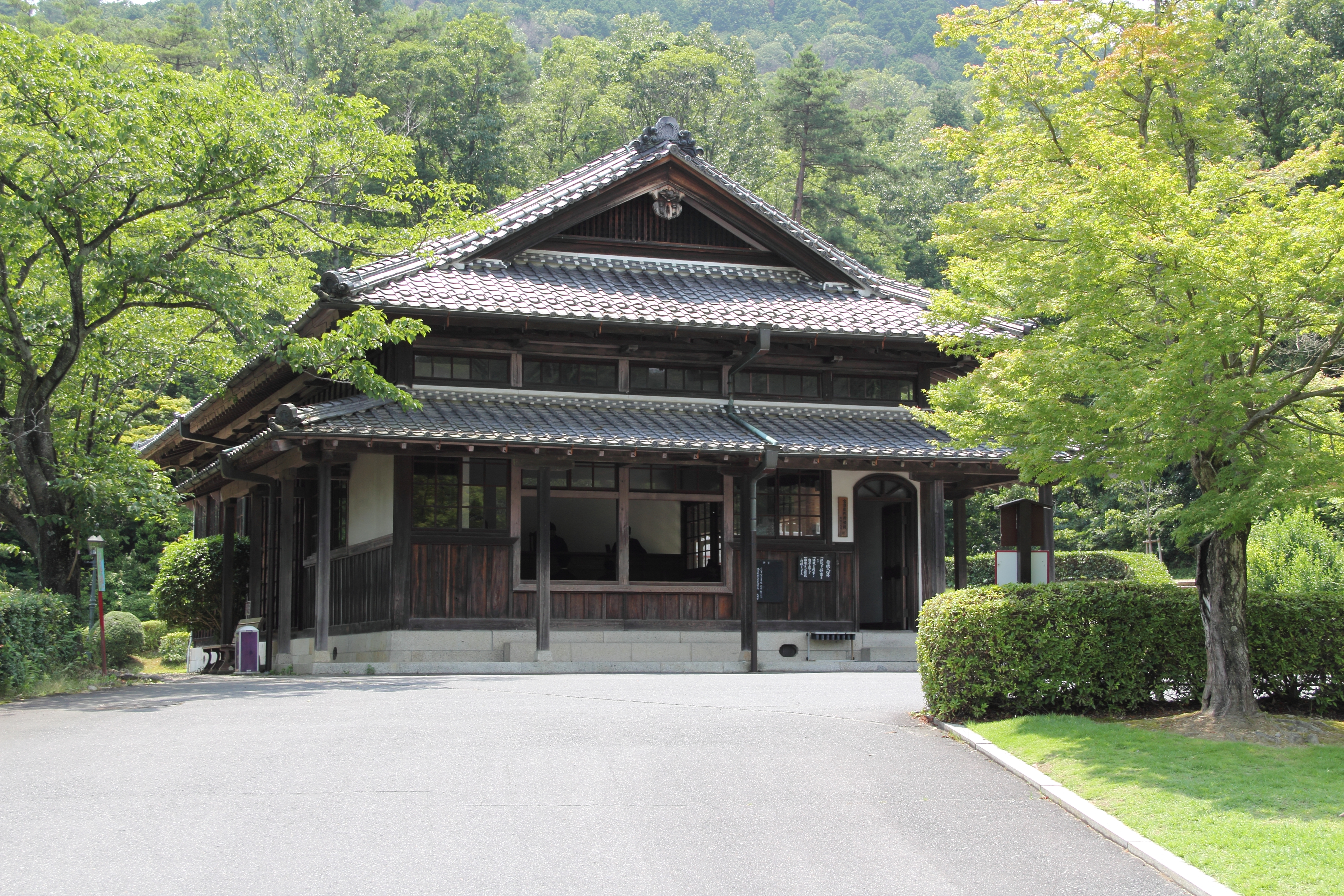 at Museum Meiji Mura